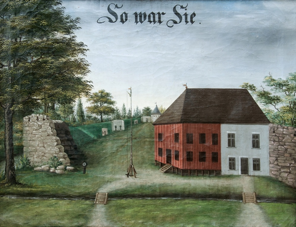 Střelnice na místě dnešního Muzea Litovel, jak pravděpodobně vypadala roku 1822. Olej. Autor: Donát Ulrich, olej na plátně, 80×65 cm, kolem roku 1870.